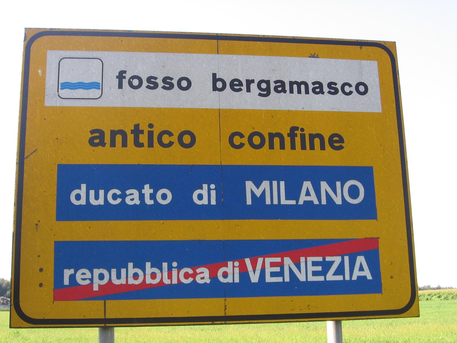 Pannello storico a Castel Rozzone, nei pressi del fosso bergamasco